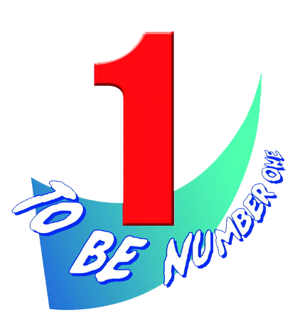 สัญลักษณ์โครงการ TO BE NUMBER ONE. สัญลักษณ์โครงการ TO BE NUMBER ONE.